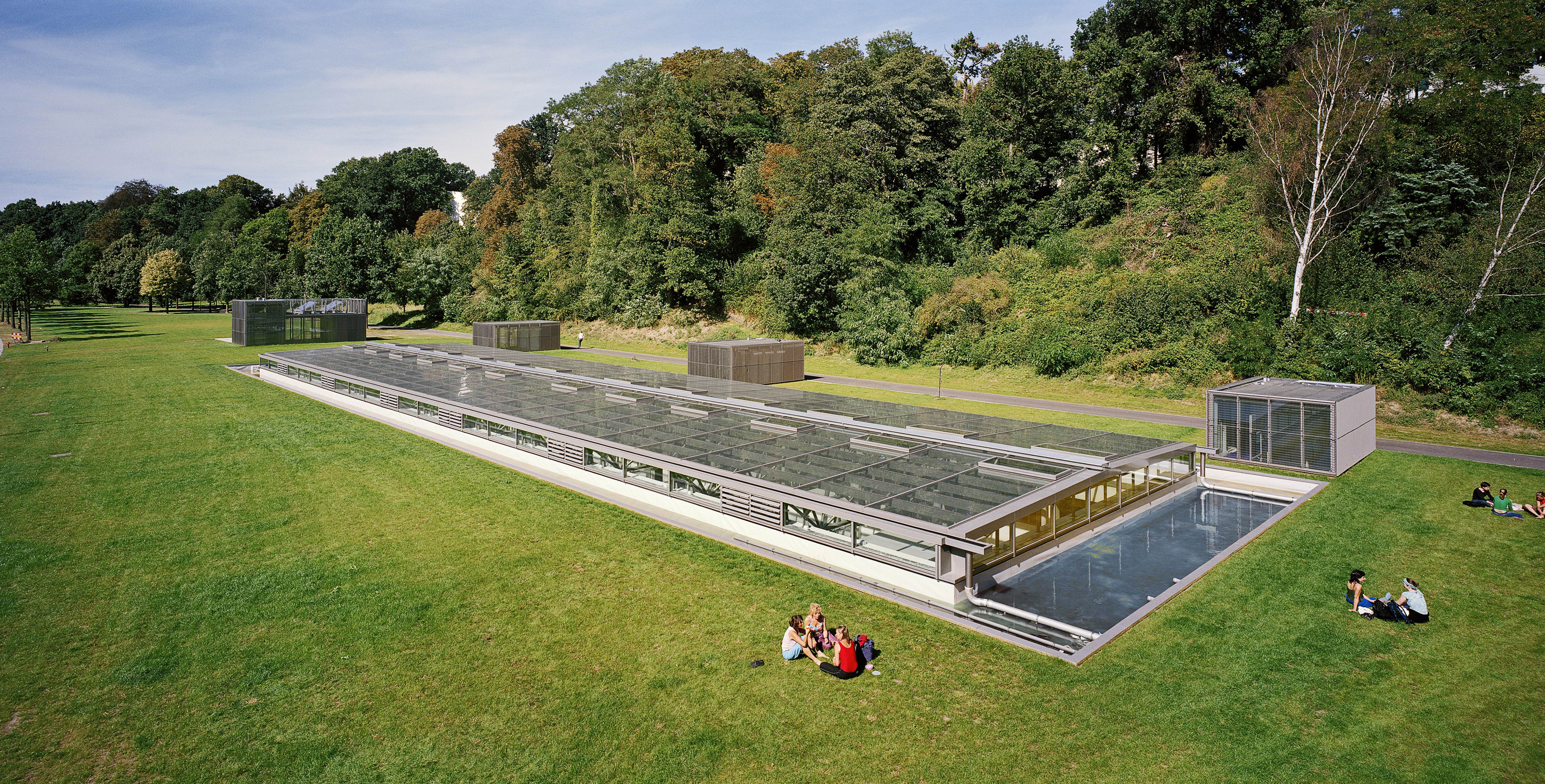 De Hogeschool voor de Kunsten in Arnhem streeft ernaar haar verschillende faculteiten zo dicht mogelijk rond het monumentale schoolgebouw van Rietveld (1958) te groeperen. Het zoeken van een geschikte locatie voor de Faculteit voor Dans en Theater kent een lange voorgeschiedenis. Voor het gebouw met een programma 7000 m² en een vereiste zaalhoogte van 11 meter, bleek er geen andere mogelijkheid dan het pal naast het Rietveldgebouw te plaatsen. Om de landschappelijke kwaliteit van dit transparante gebouw in zijn groene omgeving te handhaven en uit overweging van dubbel grondgebruik, is de nieuwe faculteit onder de grond geplaatst. Langdurig verblijf onder de grond stelt hoge psychologische eisen aan de gebruiker. Daarom is op maaiveldniveau een grote glaskap aangebracht die een ondergronds atrium rijkelijk van daglicht voorziet. Rondom deze gemeenschappelijke ruimte liggen de leslokalen, danszalen, repetitieruimtes en een theater. De materialisatie en detaillering van het ondergrondse gebouw zijn licht en helder. Uit technische overweging heeft het gebouw een orthogonale vorm. Gietijzeren dwarsliggers doorklieven de centrale ruimte en vangen de krachten op die worden veroorzaakt door bodemdruk op de zijwanden. Via een ondergrondse verbinding wordt de hoofdingang van het Rietveldgebouw gebruikt als entree voor de ondergrondse Faculteit voor Dans en Theater.